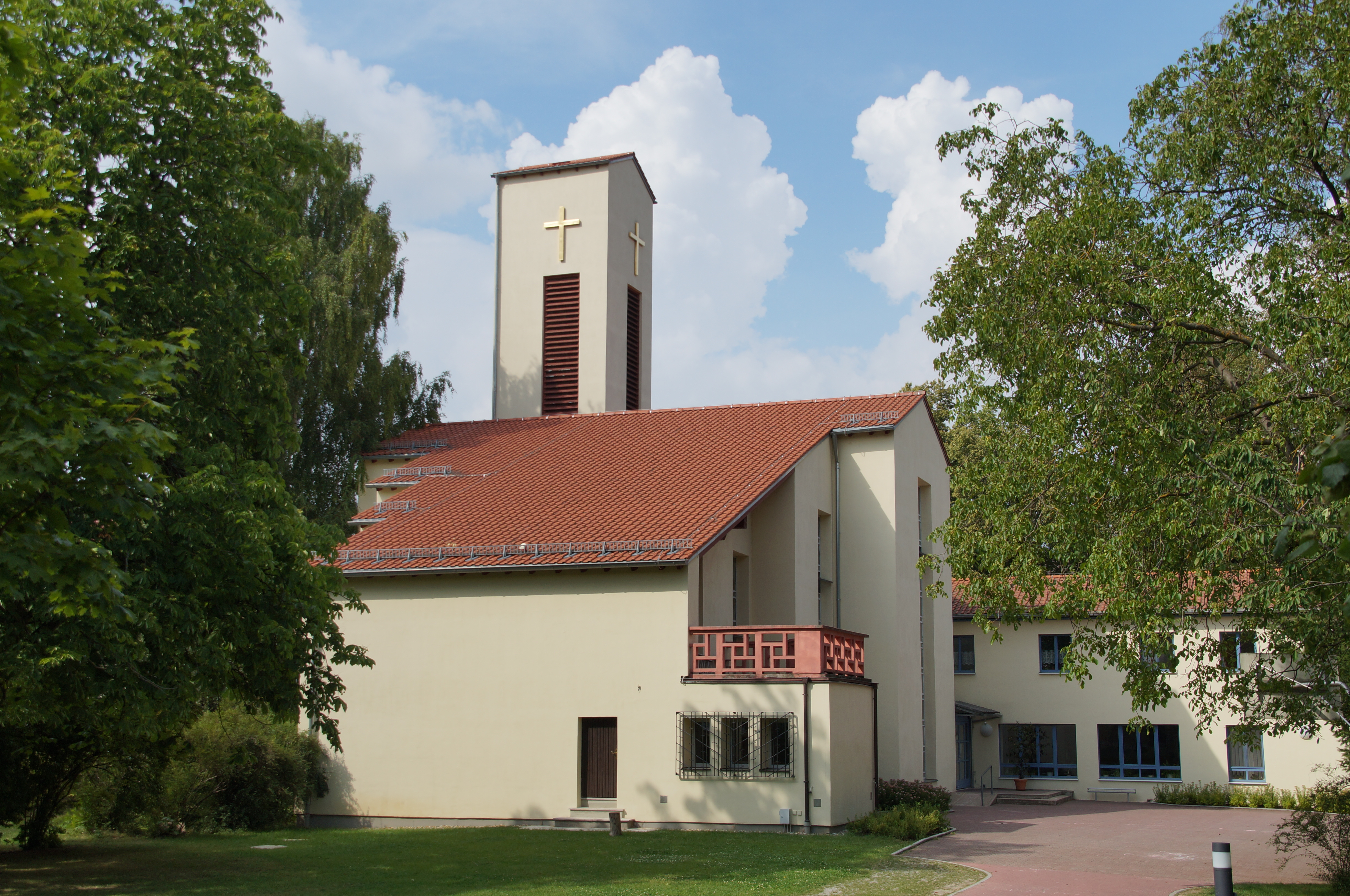 Evang. St. Matthäus Kirche in der Graf-Spee-Straße, Regensburg